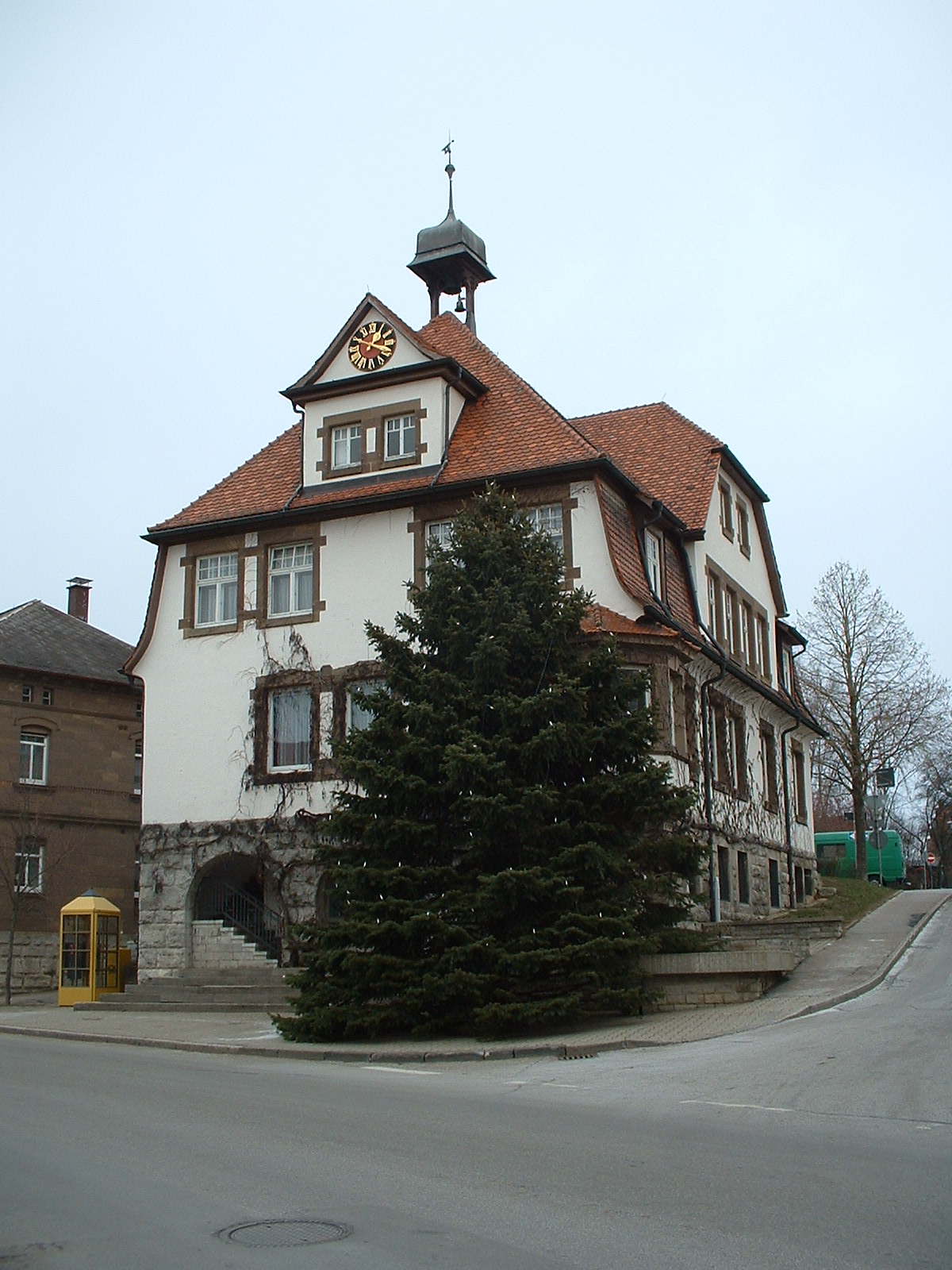 Rathaus von Gerabronn